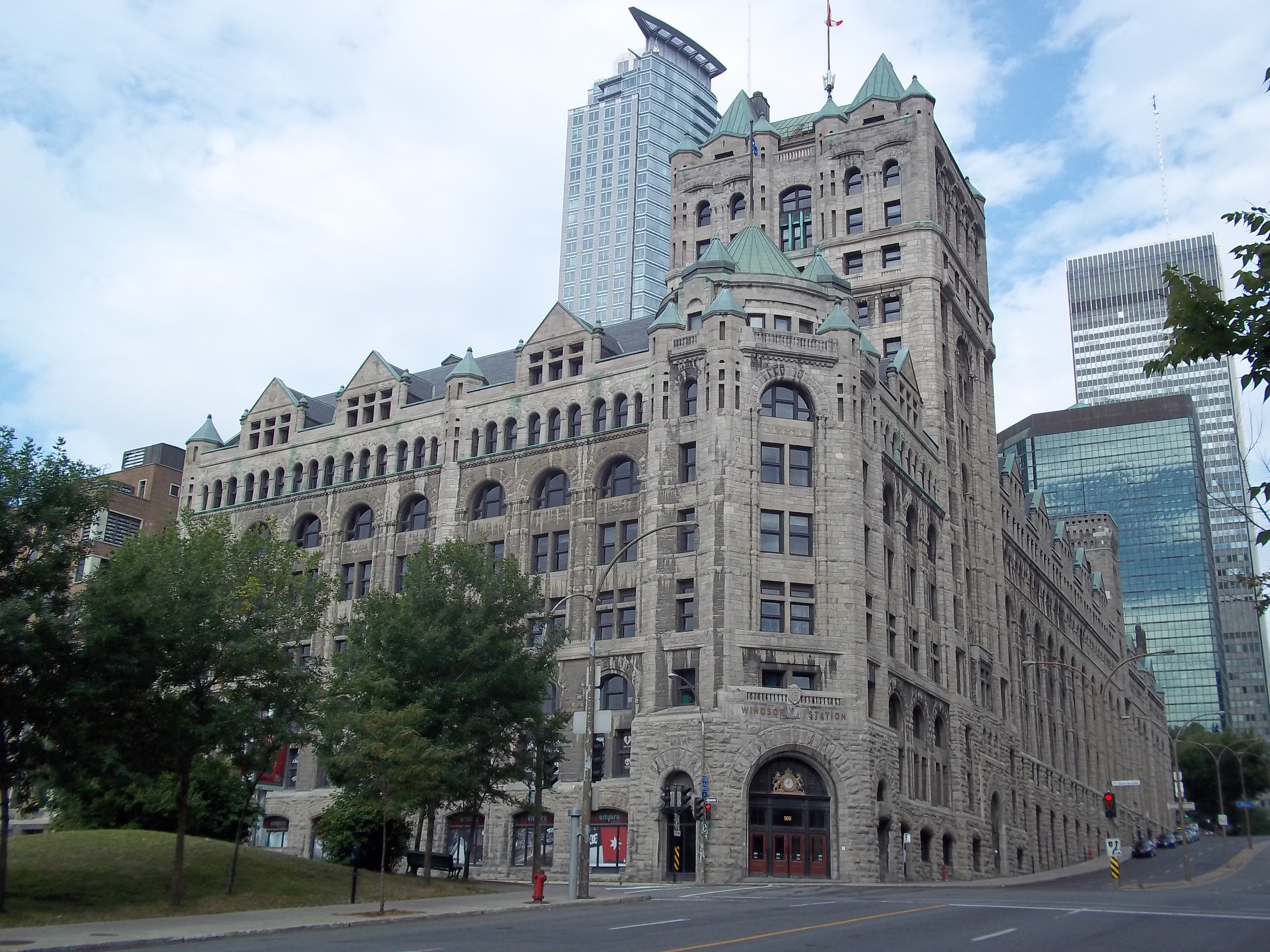 Gare Windsor de Montréal, vue du sud-est, angle des rues Peel et Saint-Antoine